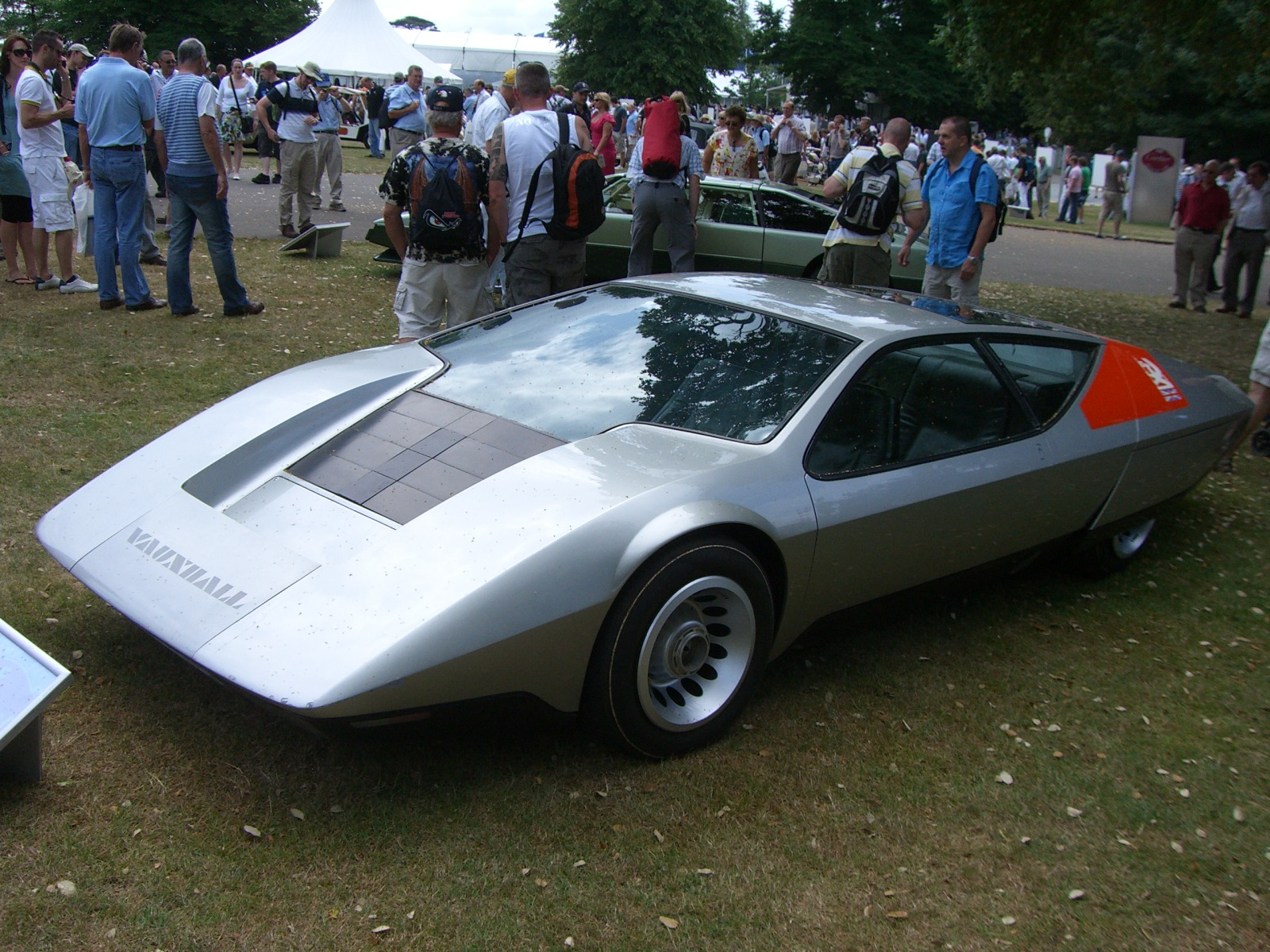 Vauxhall SRV